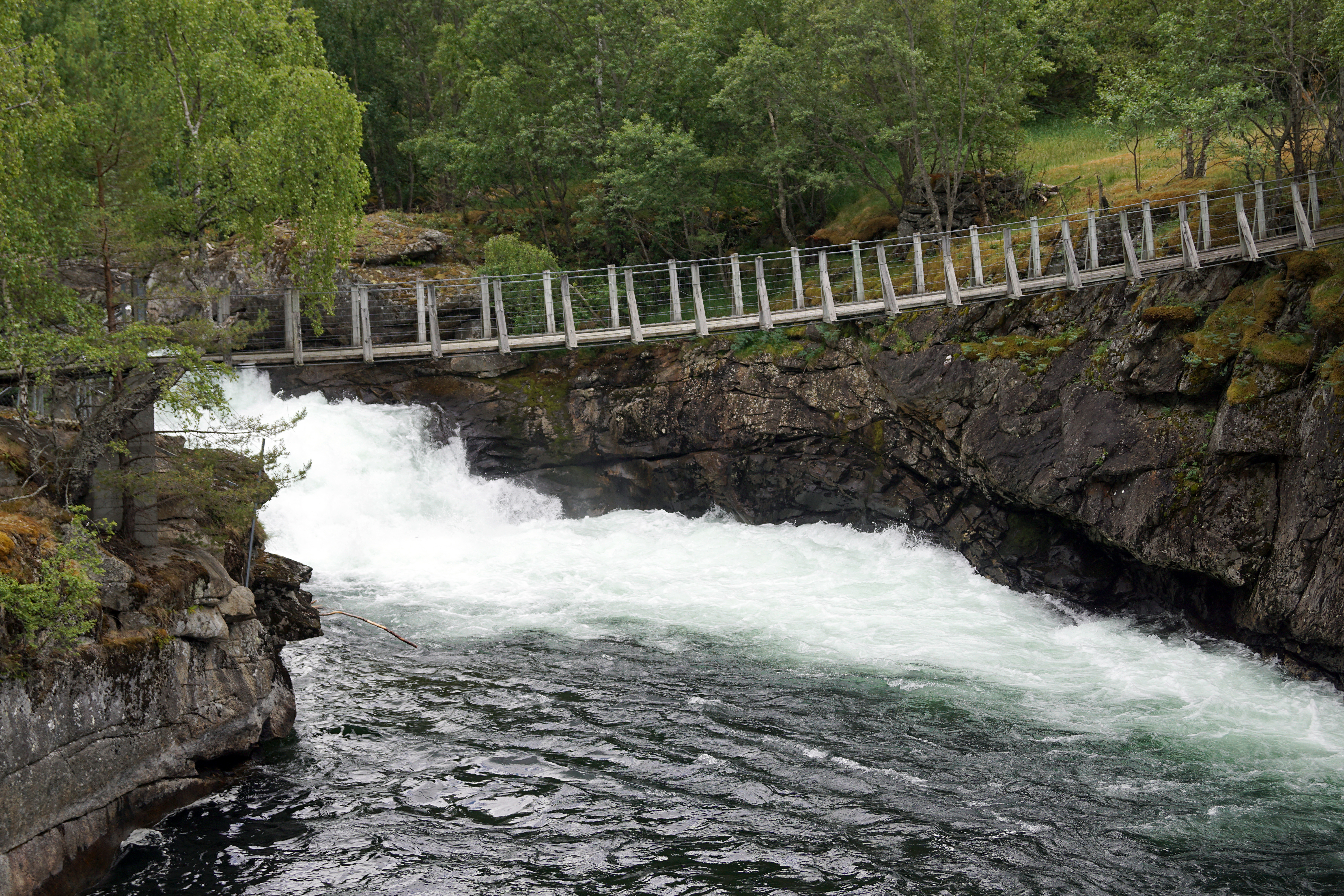 Lærdalselvi i Lærdalen